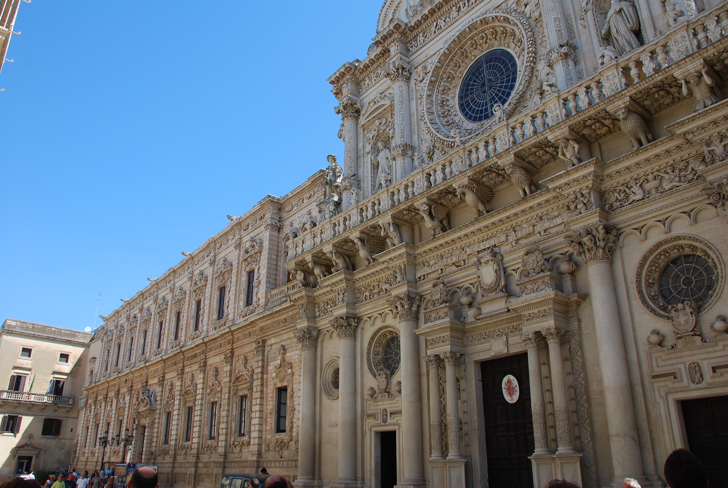 Lecce Santa Croce 2008